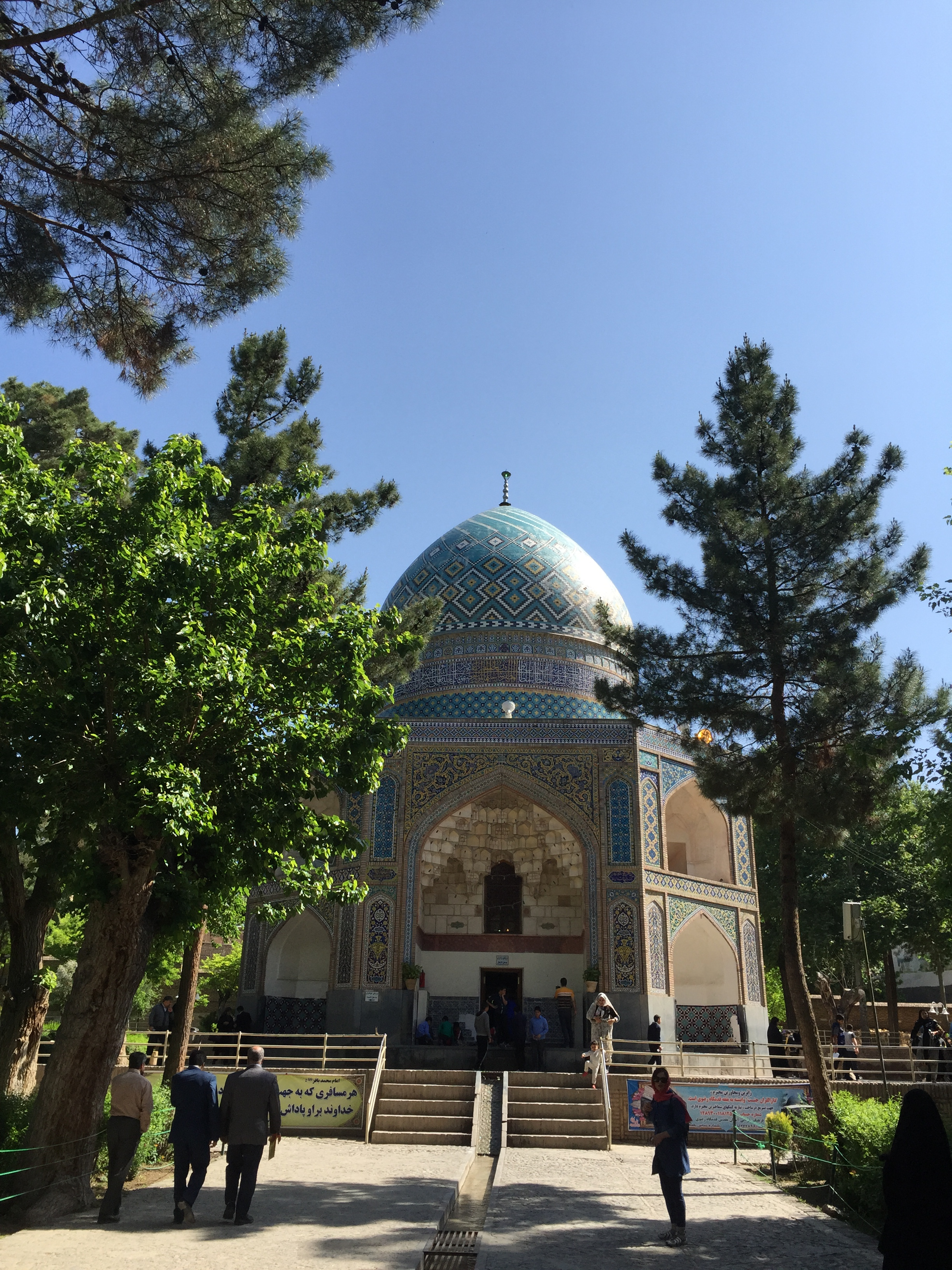 مجموعه تاریخی قدمگاه، بقعه و رباط و حمام